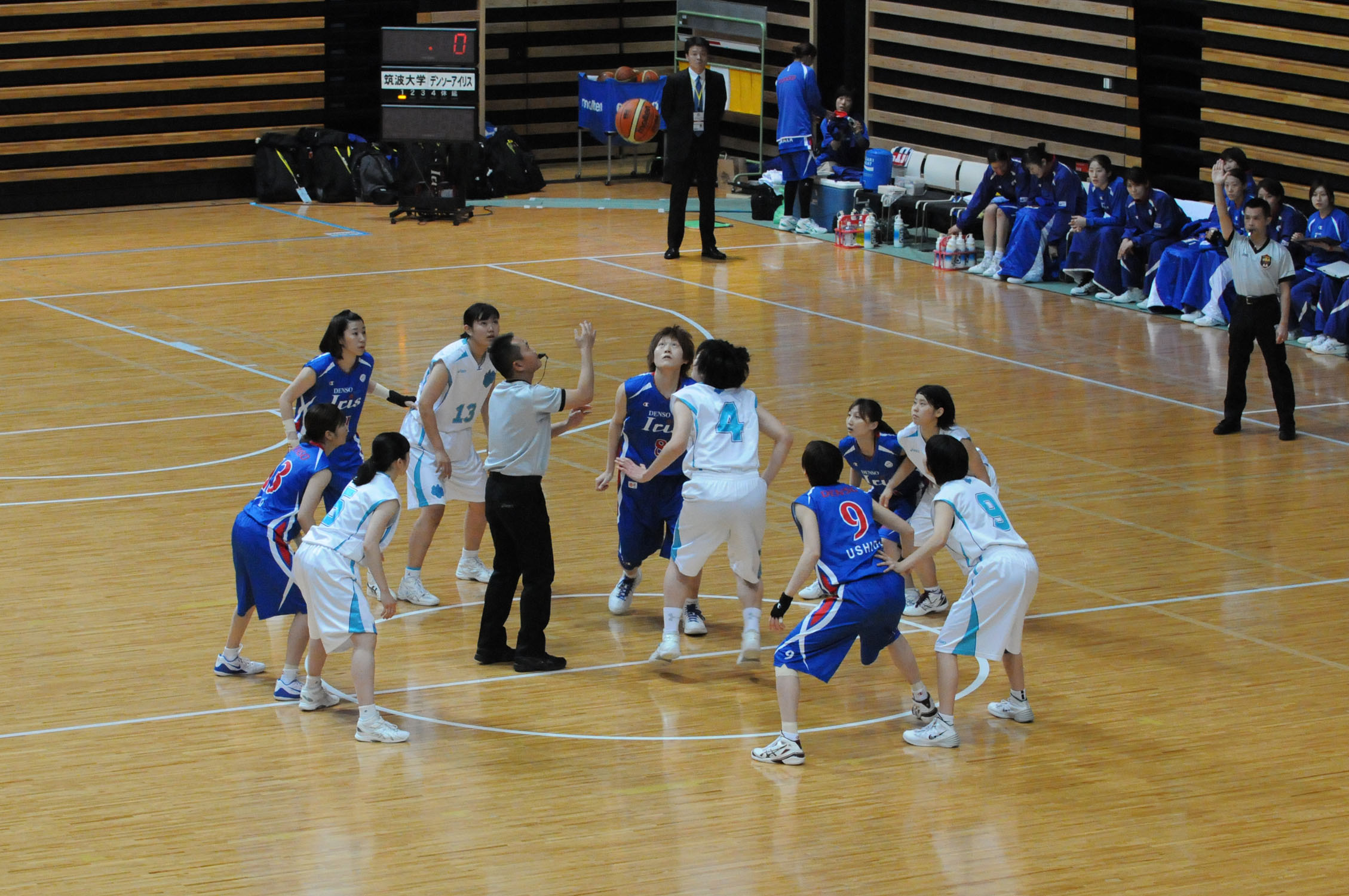 2015年全日本総合バスケットボール選手権大会3回戦、筑波大学対デンソーアイリス。大田区総合体育館で。